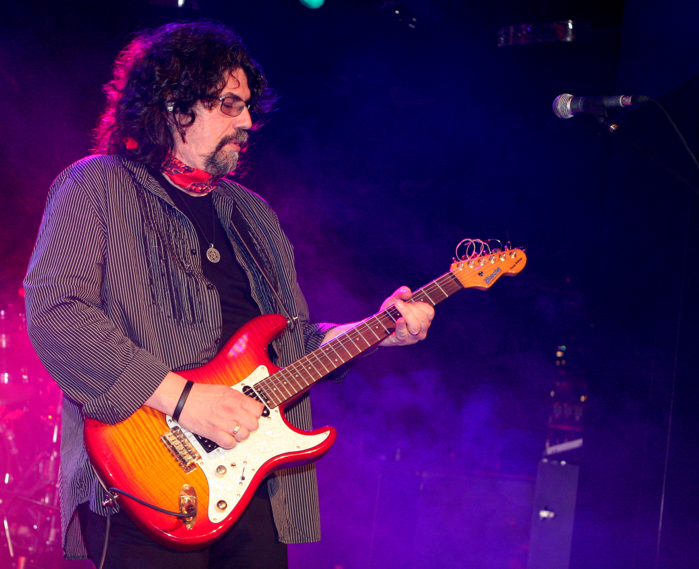 Phil Bates / La Electric Light Orchestra Pt. 2 en la sala Luz de Gas de Barcelona el 6 de Junio de 2008.